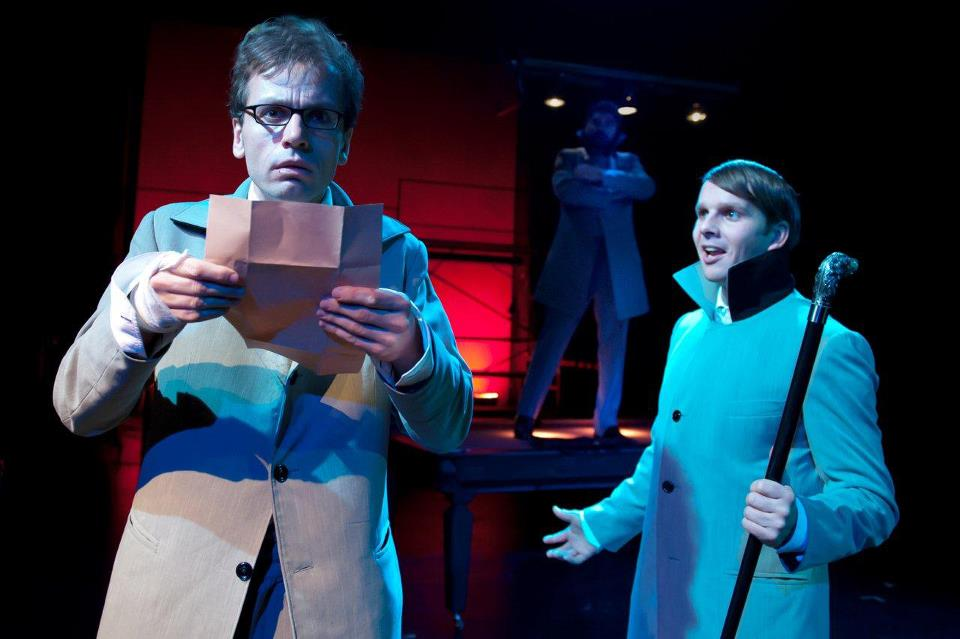 Snímek z inscenace "Dr. Jekyl & Mr. Hyde" autora Jeffreyho Hatchera v režii Pavla Kheka. Na snímku Petr Mikeska, Svatava Milková, Roman Teprt.